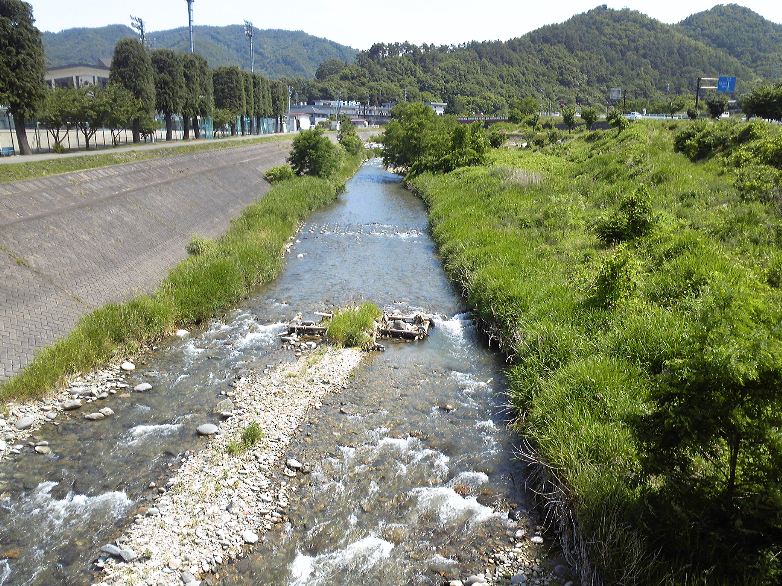 内村川。長野県上田市御嶽堂、りんどう橋より上流方向。